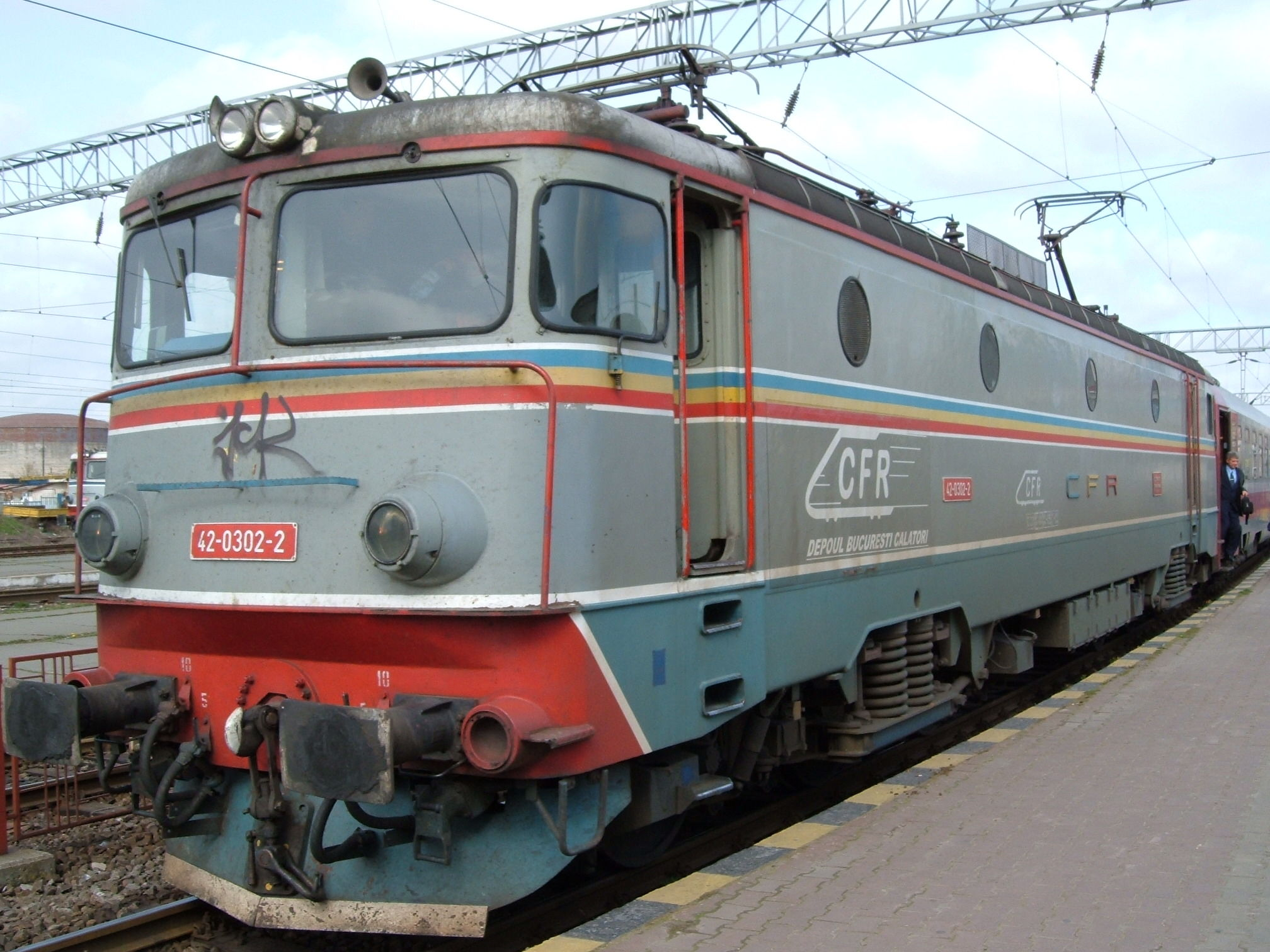 Locomotiva CFR clasa 42